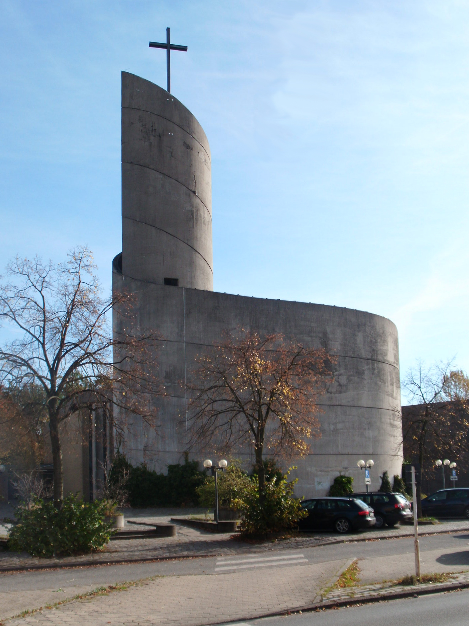 Krieterstraße 7